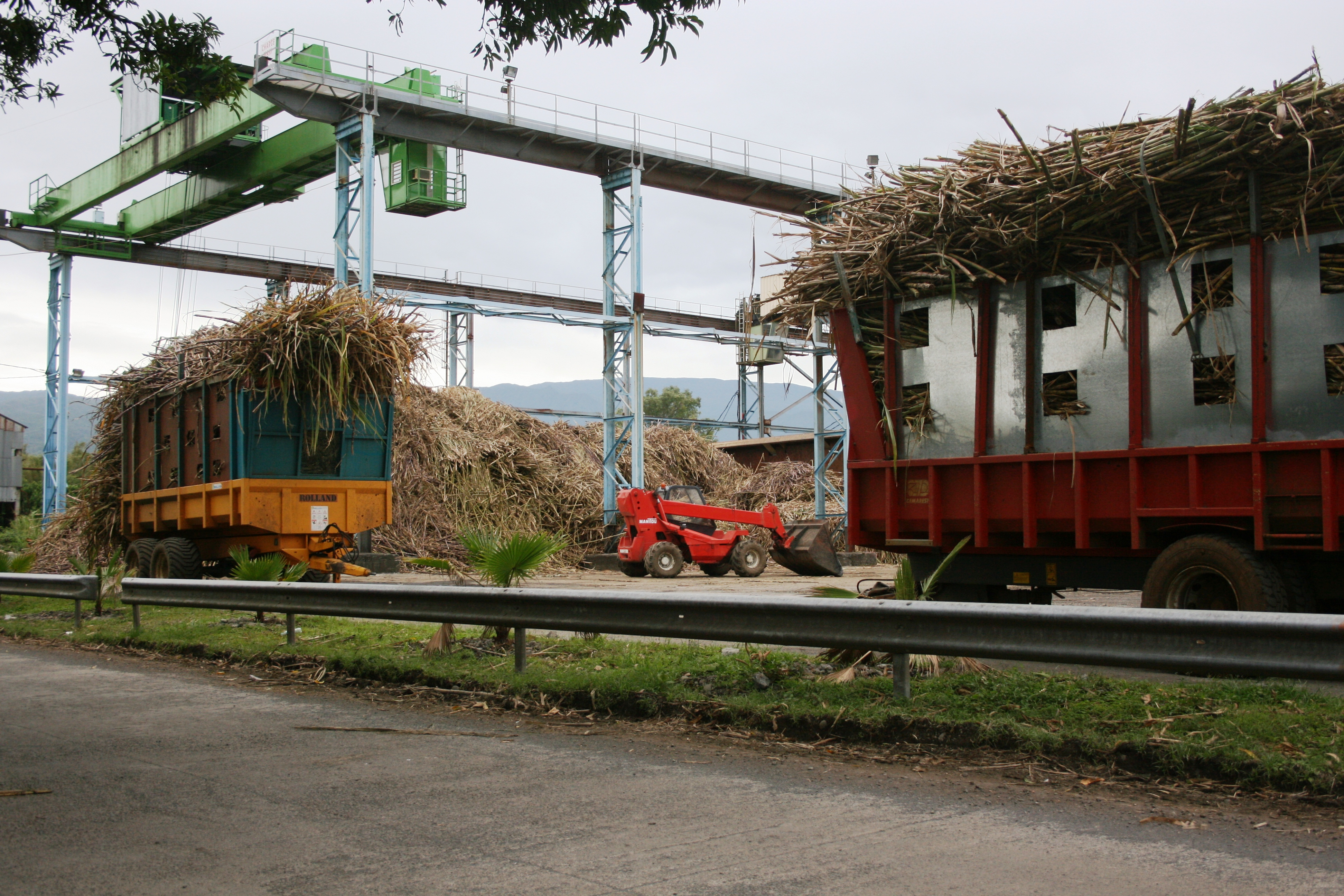 Des remorques chargées de cannes à sucre devant la balance de l'usine de Beaufonds à Saint-Benoît, sur l'île de la Réunion